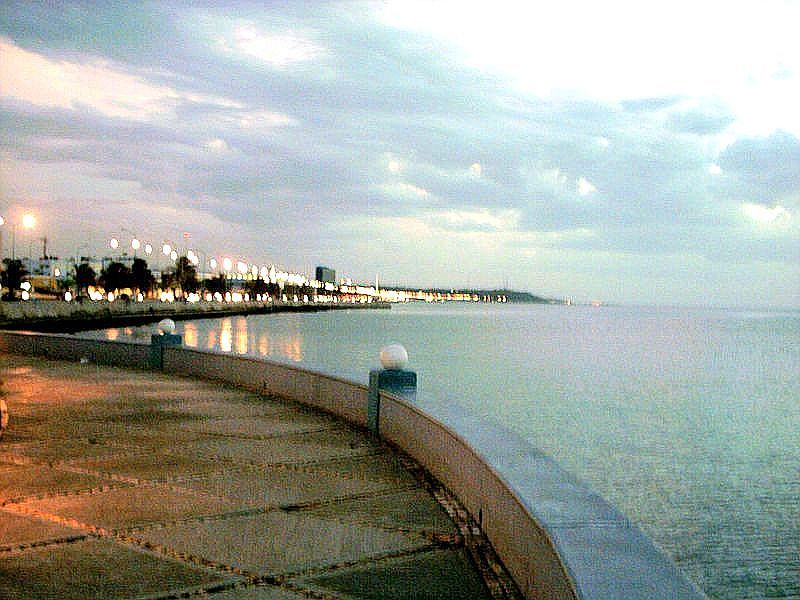 Malecón campechano al atardecer, foto de 2005.